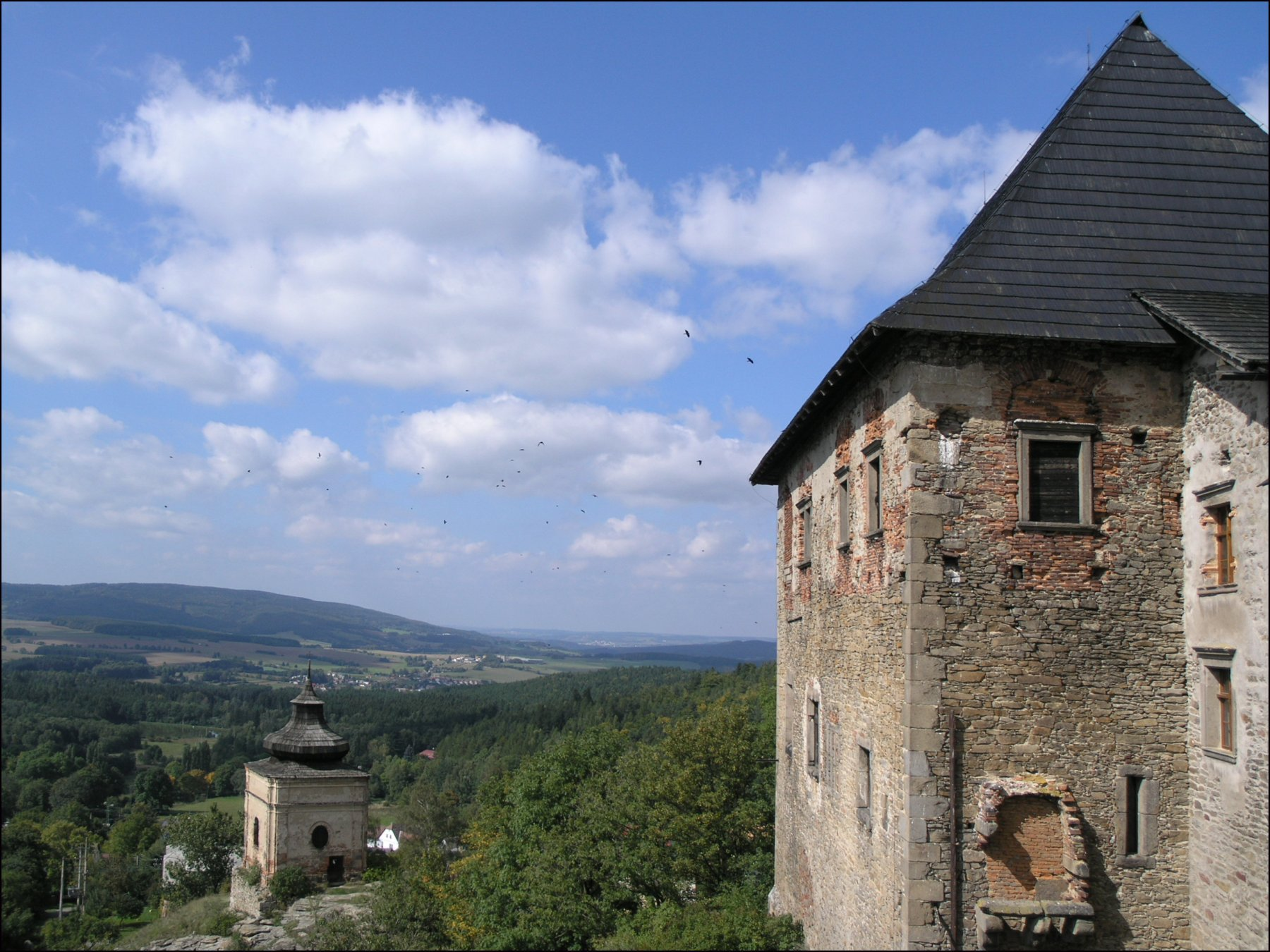 Hrad Lipnice nad Sázavou - barokní zvonice a JZ nároží Thurnovského paláce